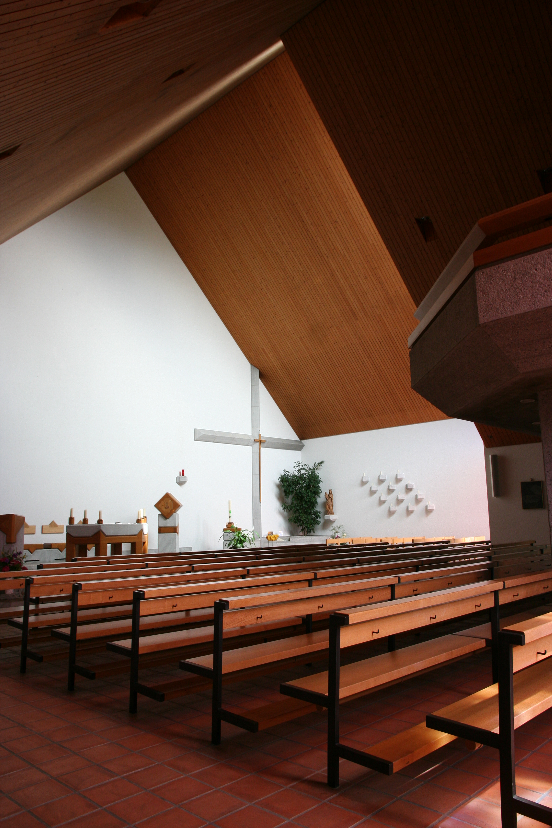 Römisch-katholische Pfarrkirche Hl. Familie Schönenberg ZH